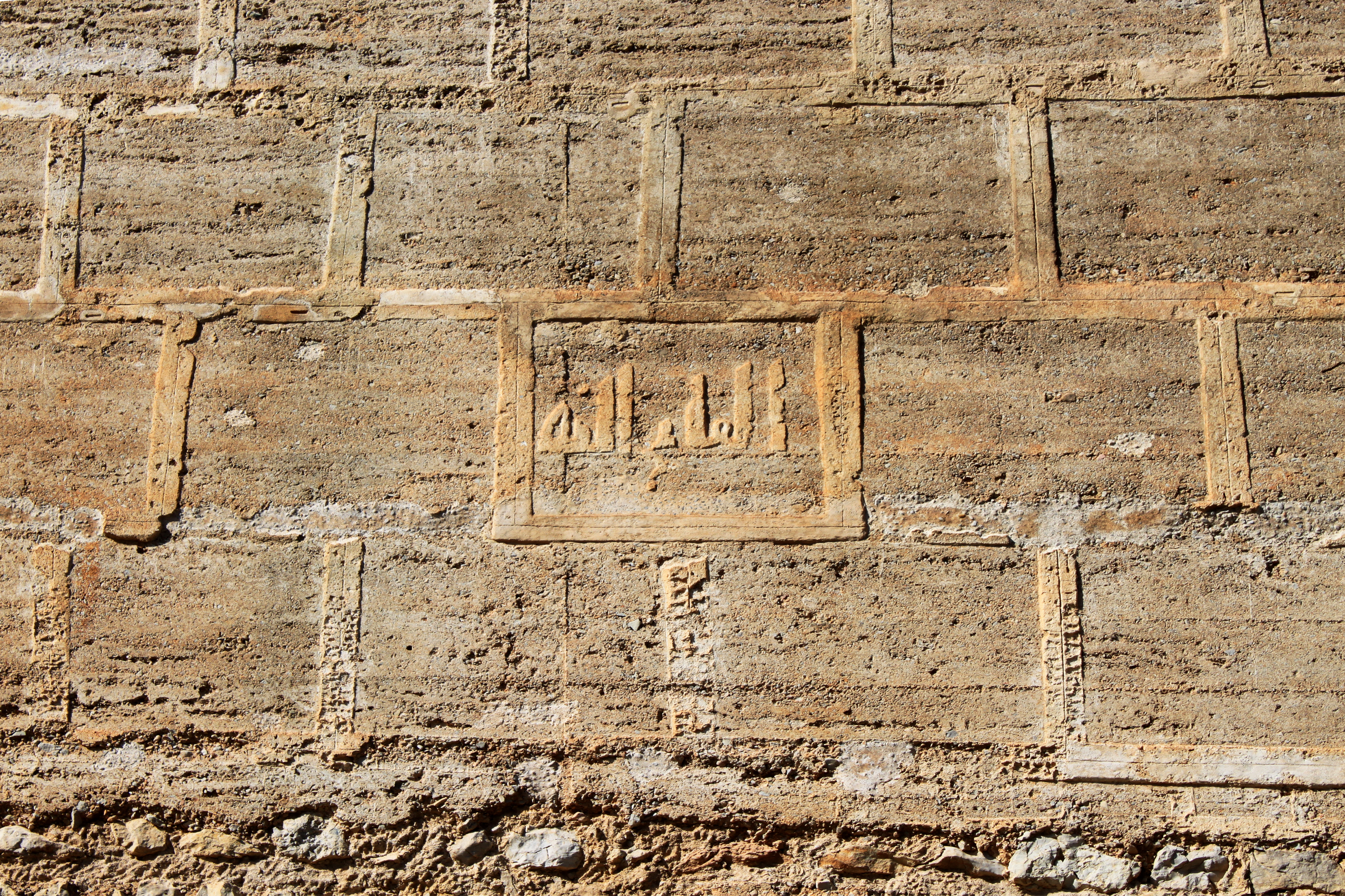 Inscripción en árabe situada en la muralla sureste del albacar de la fortaleza. Puede leerse el que concede la victoria es Dios (al-fatih Allah). Este tramo de muralla se corresponde con un recrecimiento realizado con tapial calicostrado y presenta decoración simulando sillería. Alcalá de Xivert, provincia de Castellón, Comunidad Valenciana, España.